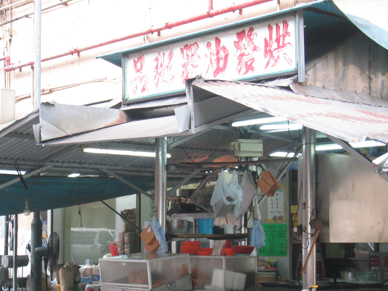 2005年，香港深水埗耀東街一家大牌檔在售賣粥品。A dai pai dong selling congee on Yiu Tung Street, Sham Shui Po, Hong Kong, in 2005.